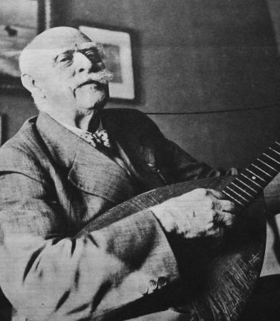 Jeremias i Tröstlösa, pseud. for Levi Rickson (1868-1967)